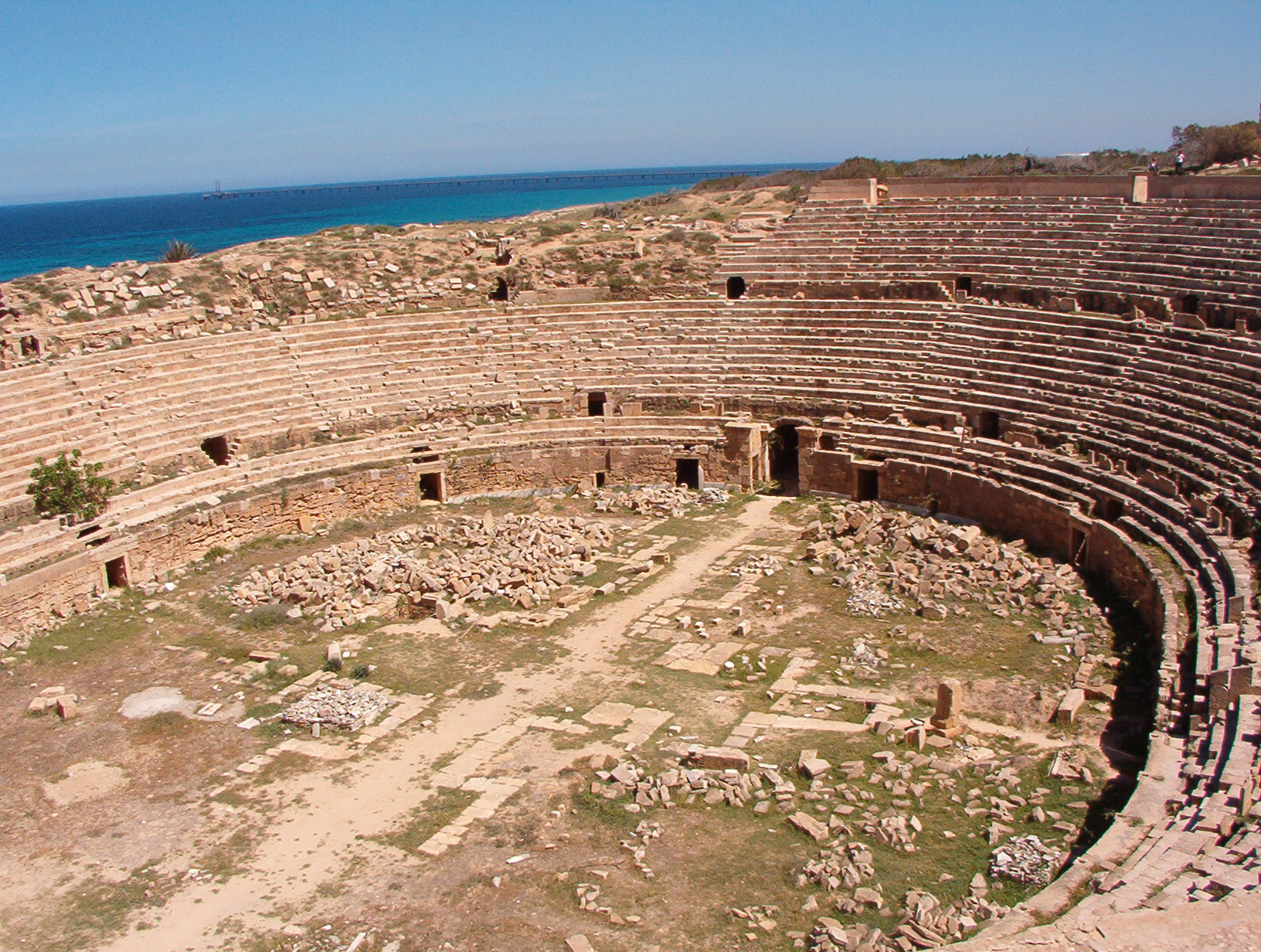 Immagini scattata da me durante un viaggio nella Jamahirija. Particolare del versante settentrionale.